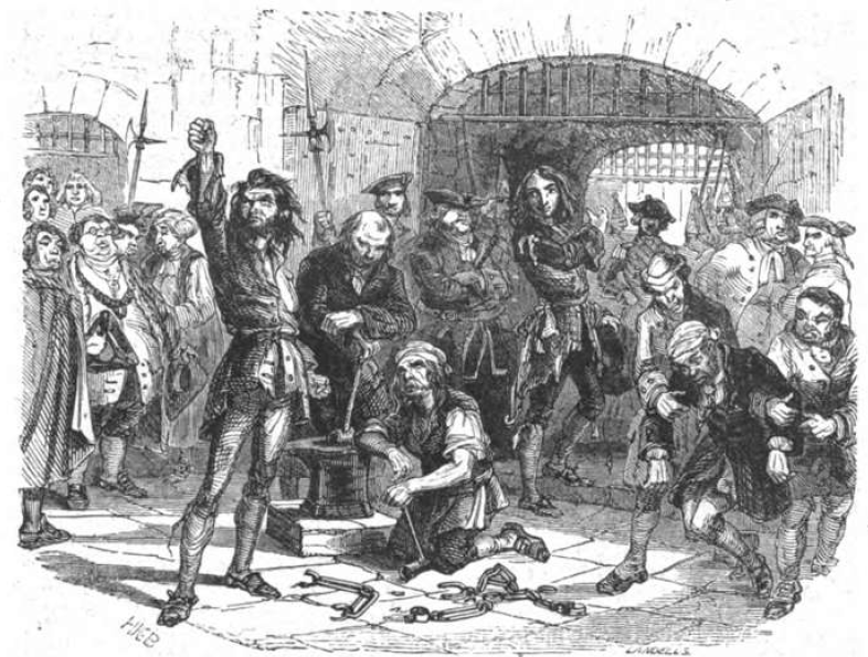 Hugh und Dennis fünf Minuten vor der Hinrichtung. Aus Barnaby Rudge.